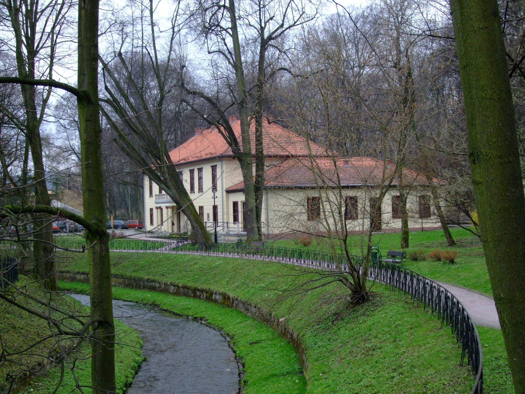 Pałac Stary, dawna siedziba rodu Potockich; obecnie w budynku urzęduje burmistrz gminy Krzeszowice.